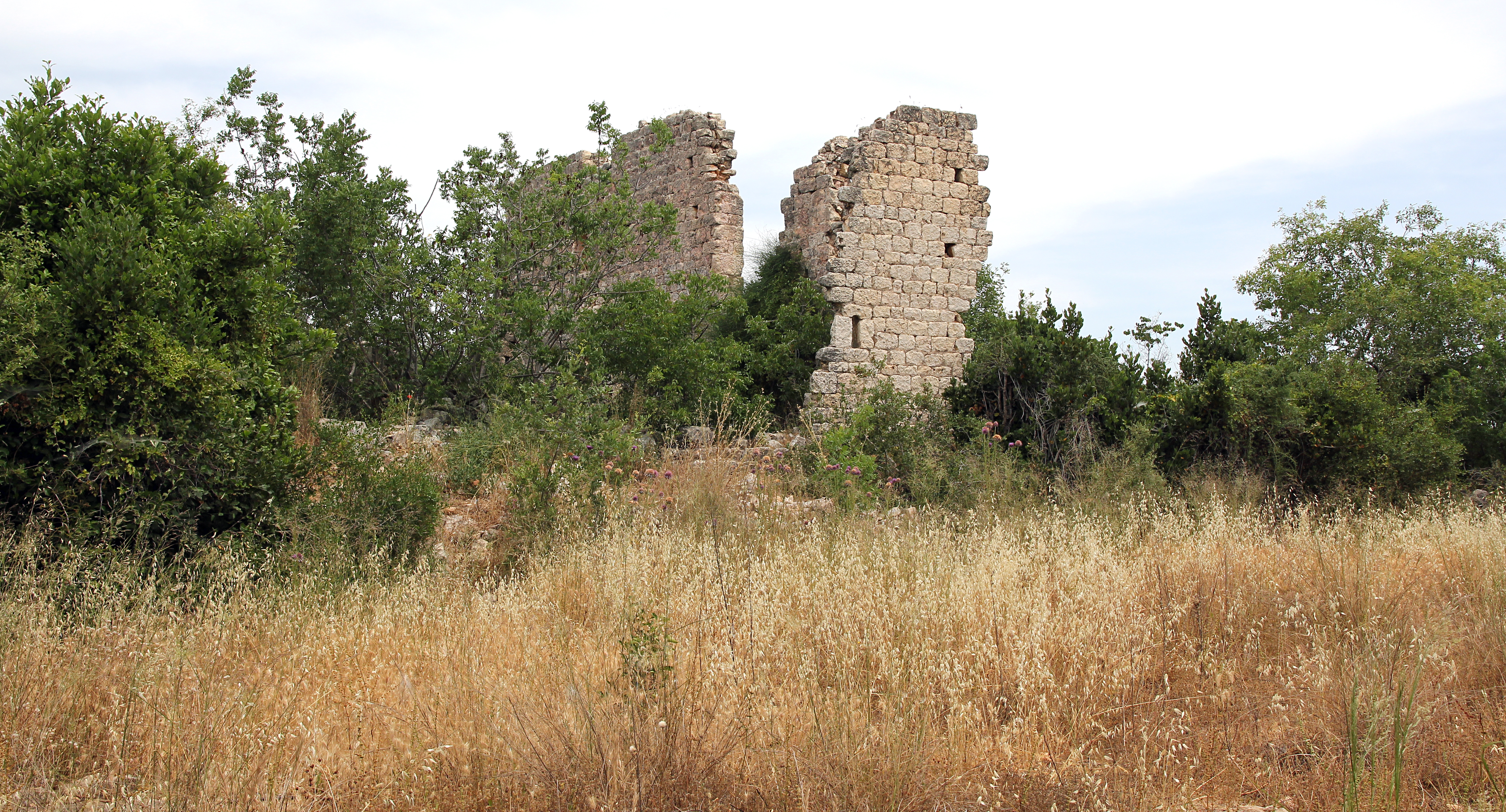 Şamlıgöl, kaiserzeitliche Siedlung in der Umgebung von Erdemli, Südtürkei, Haus A von Südwesten